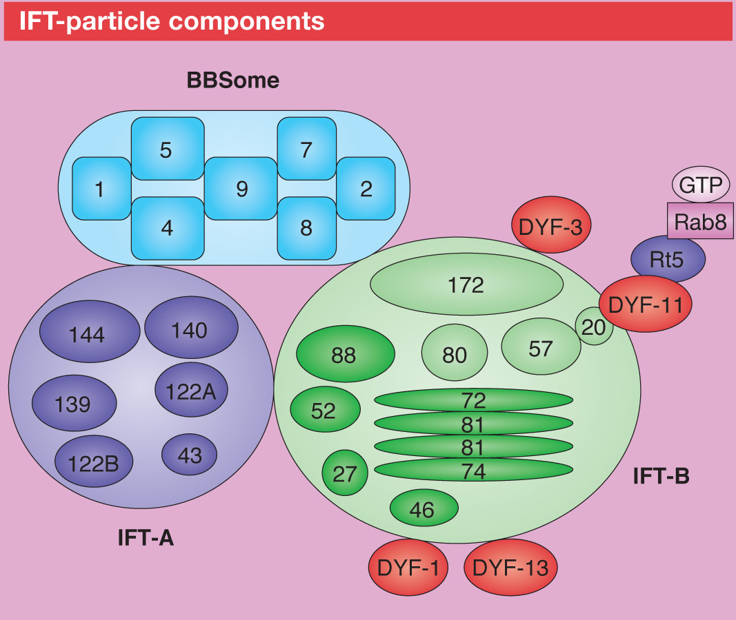 Структура ИФТ частицы